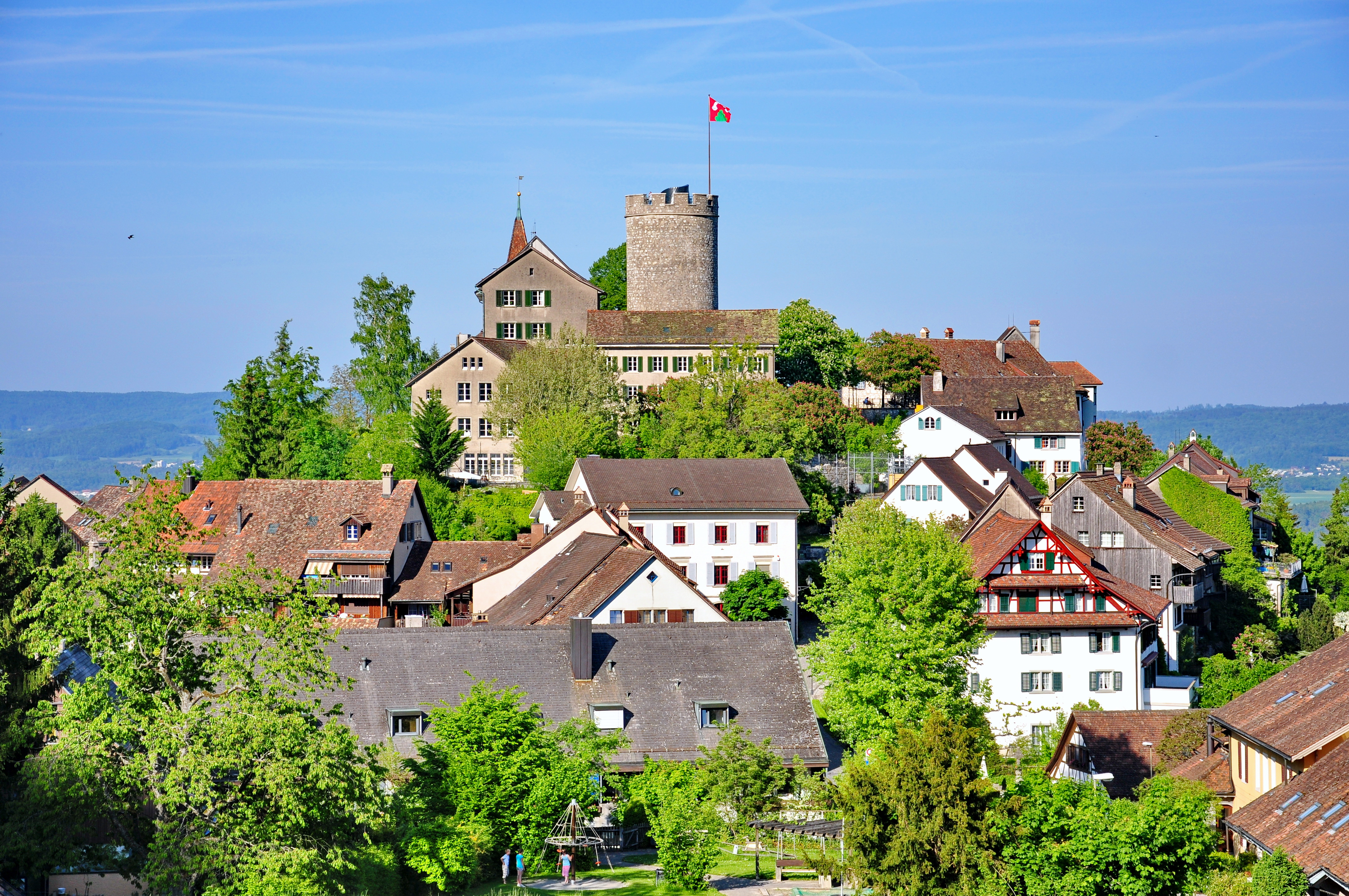 Regensberg as seen from Lägern (Switzerland)